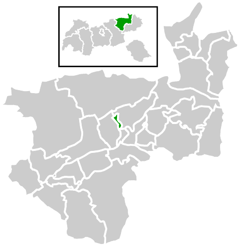 Lage der Gemeinde innerhalb des Bezirks Kufstein